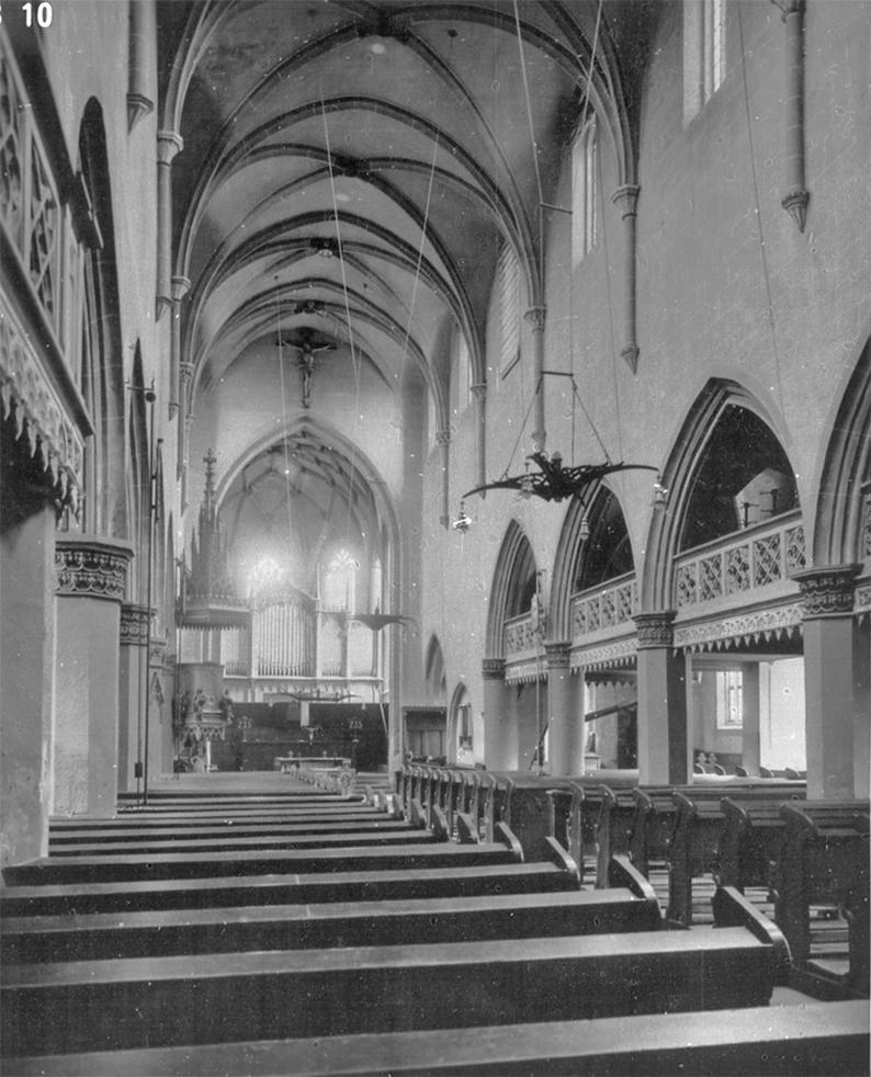 Einrichtung der Bartholmäuskirche Markgröningen vor der Umgestaltung um 1955: Durchgehende Südempore, Kruzifixus über dem Triumphbogen, Taufstein vor dem Altar, Chorschranke, Orgel im Chor